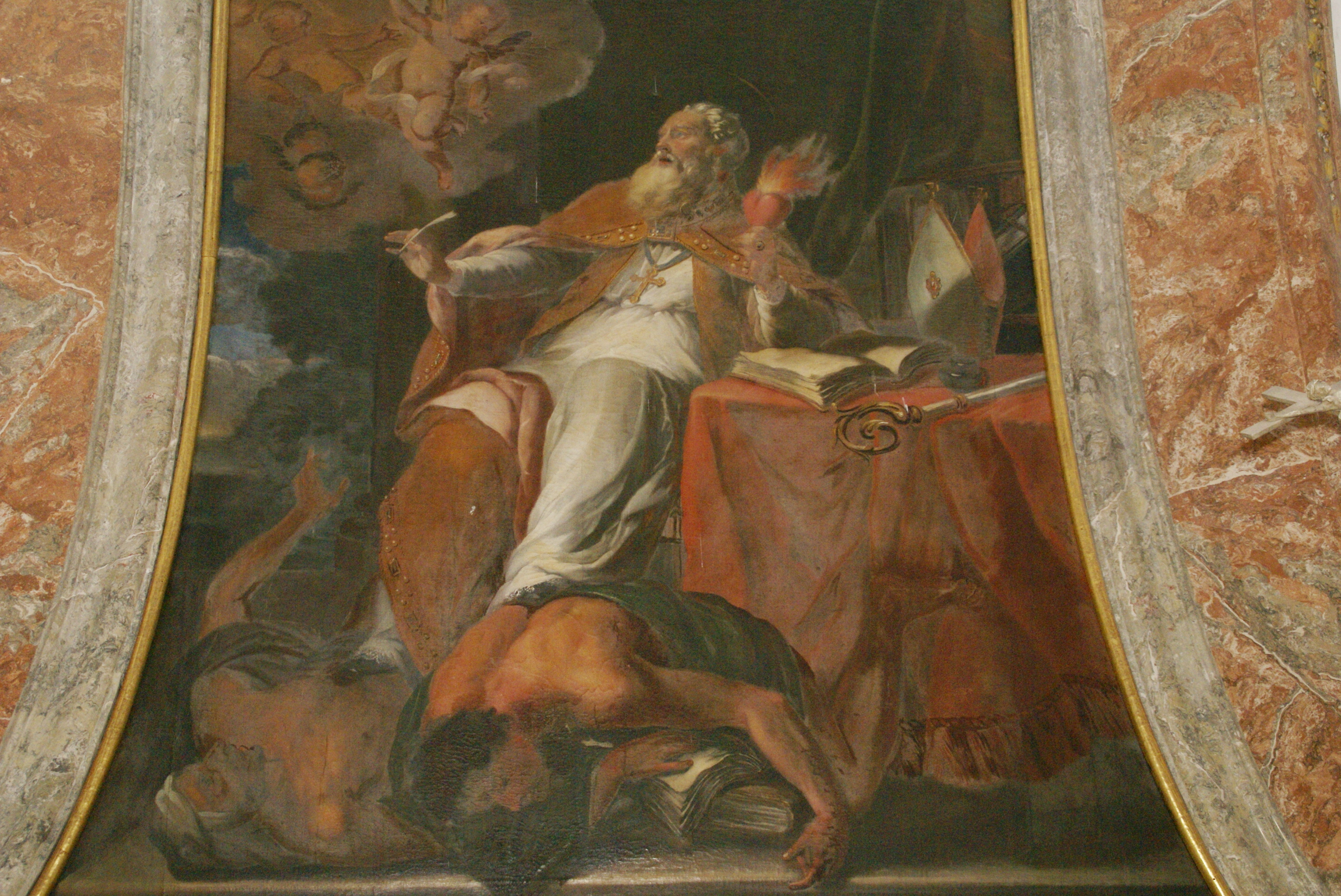 Ehemaliges Stift Sankt Andrä an der Traisen: Detail des Augustinusaltares links vorne im Kirchenschiff